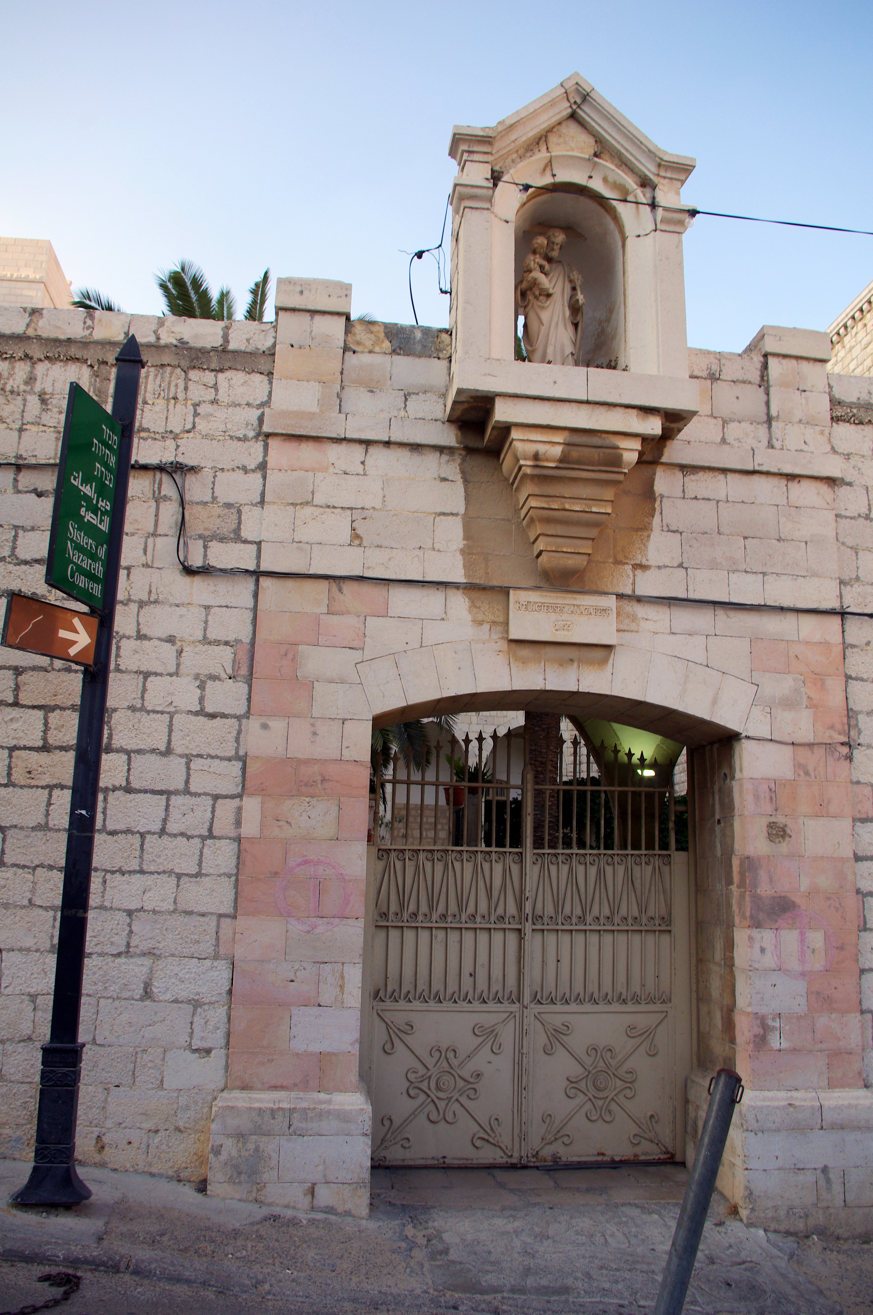 Na ulici